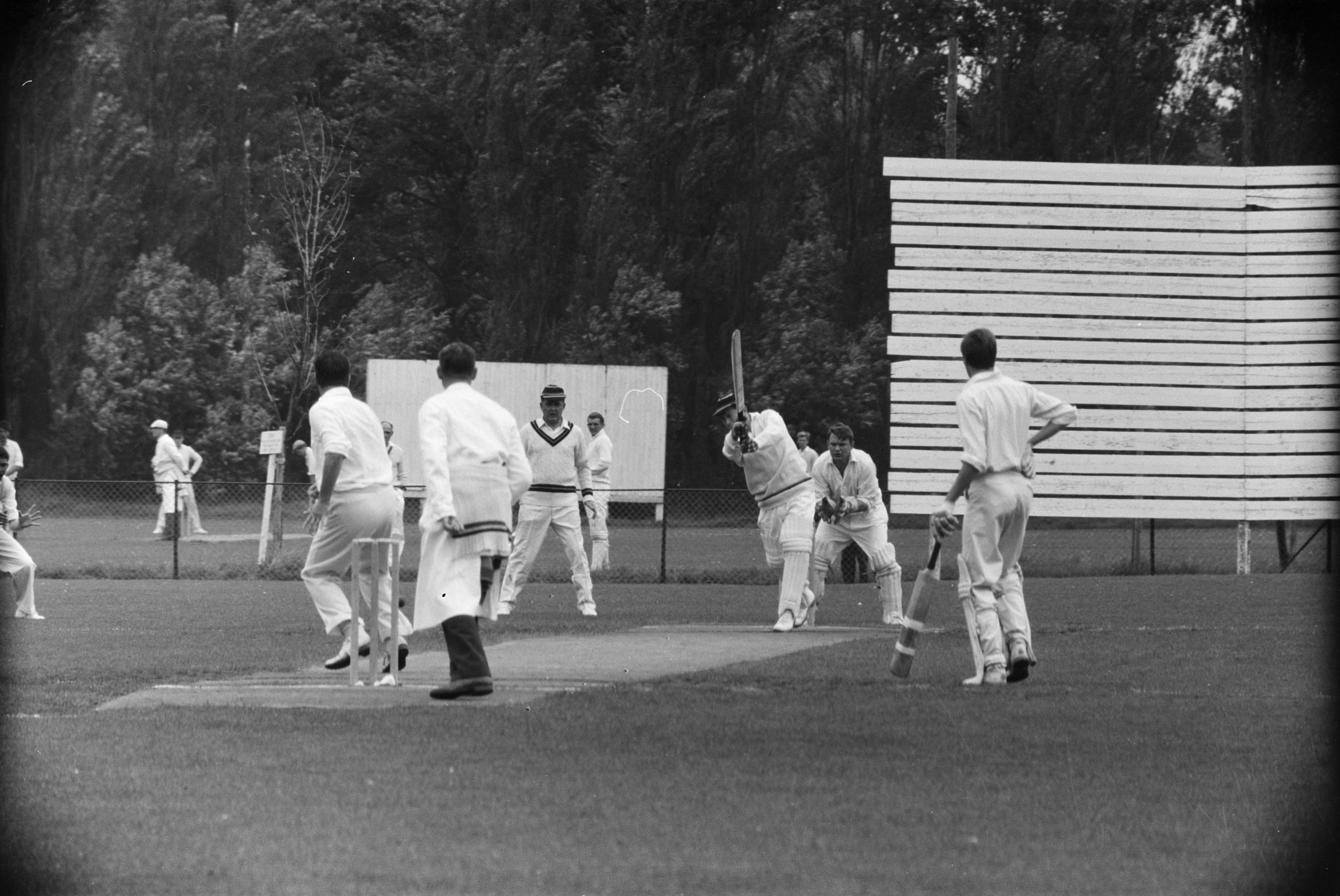 Collectie / Archief : Fotocollectie Anefo Reportage / Serie : [ onbekend ] Beschrijving : Cricekt HCC tegen Sparta Datum : 20 augustus 1961 Trefwoorden : cricket Persoonsnaam : Hcc Instellingsnaam : Sparta Fotograaf : Pot, Harry / Anefo Auteursrechthebbende : Nationaal Archief Materiaalsoort : Negatief (zwart/wit) Nummer archiefinventaris : bekijk toegang 2.24.01.05 Bestanddeelnummer : 912-8511